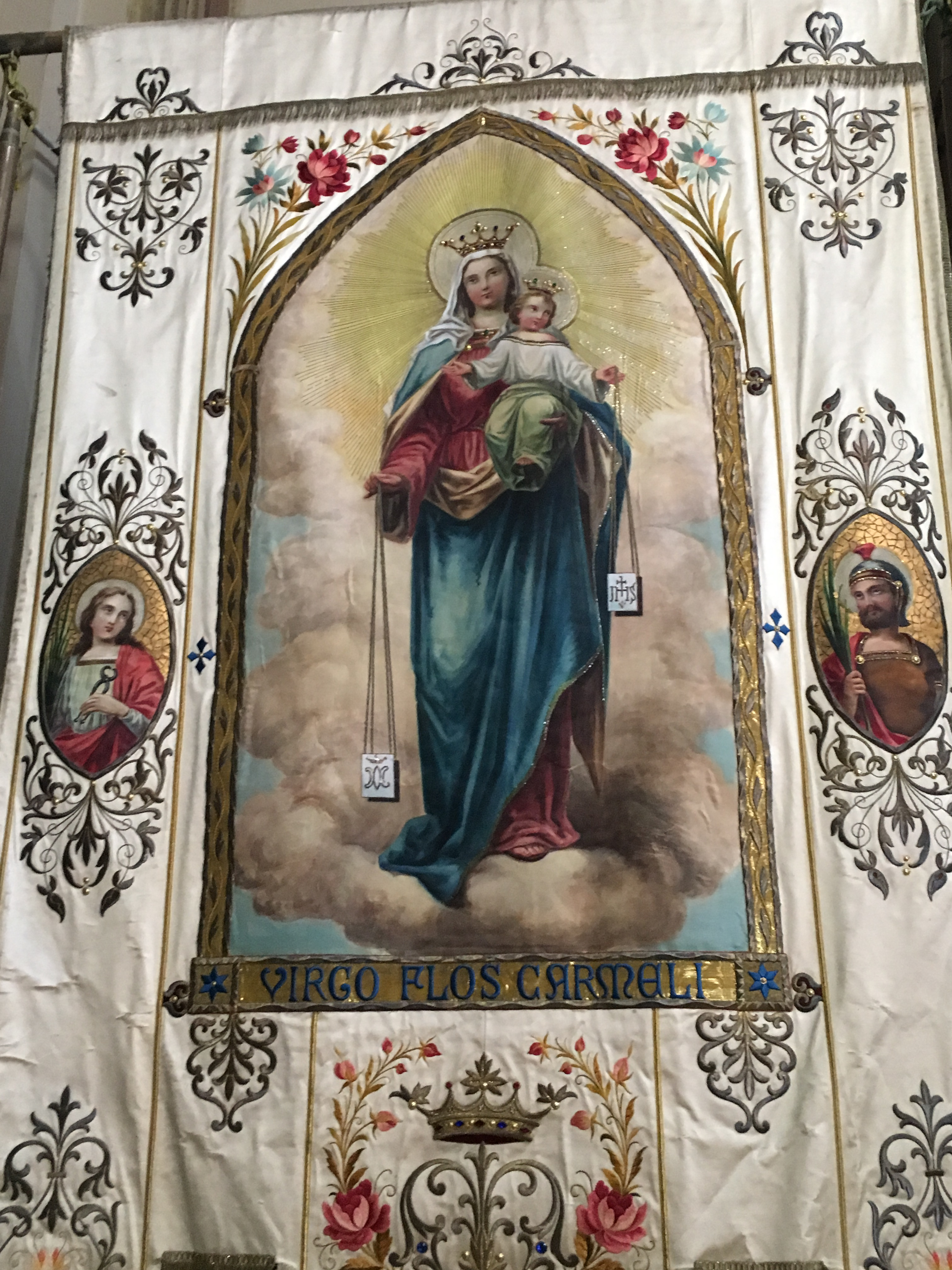 Santa Apollonia e San Fermo